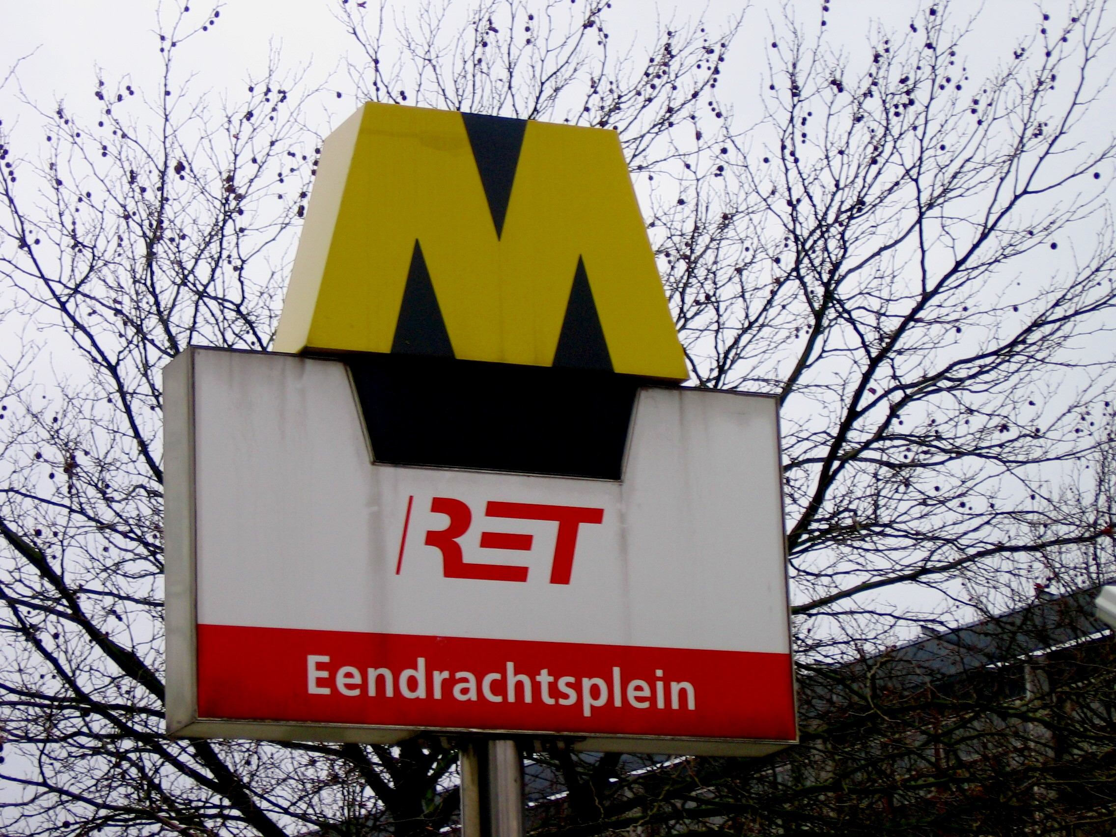 Metrostation Eendrachtsplein Rotterdam